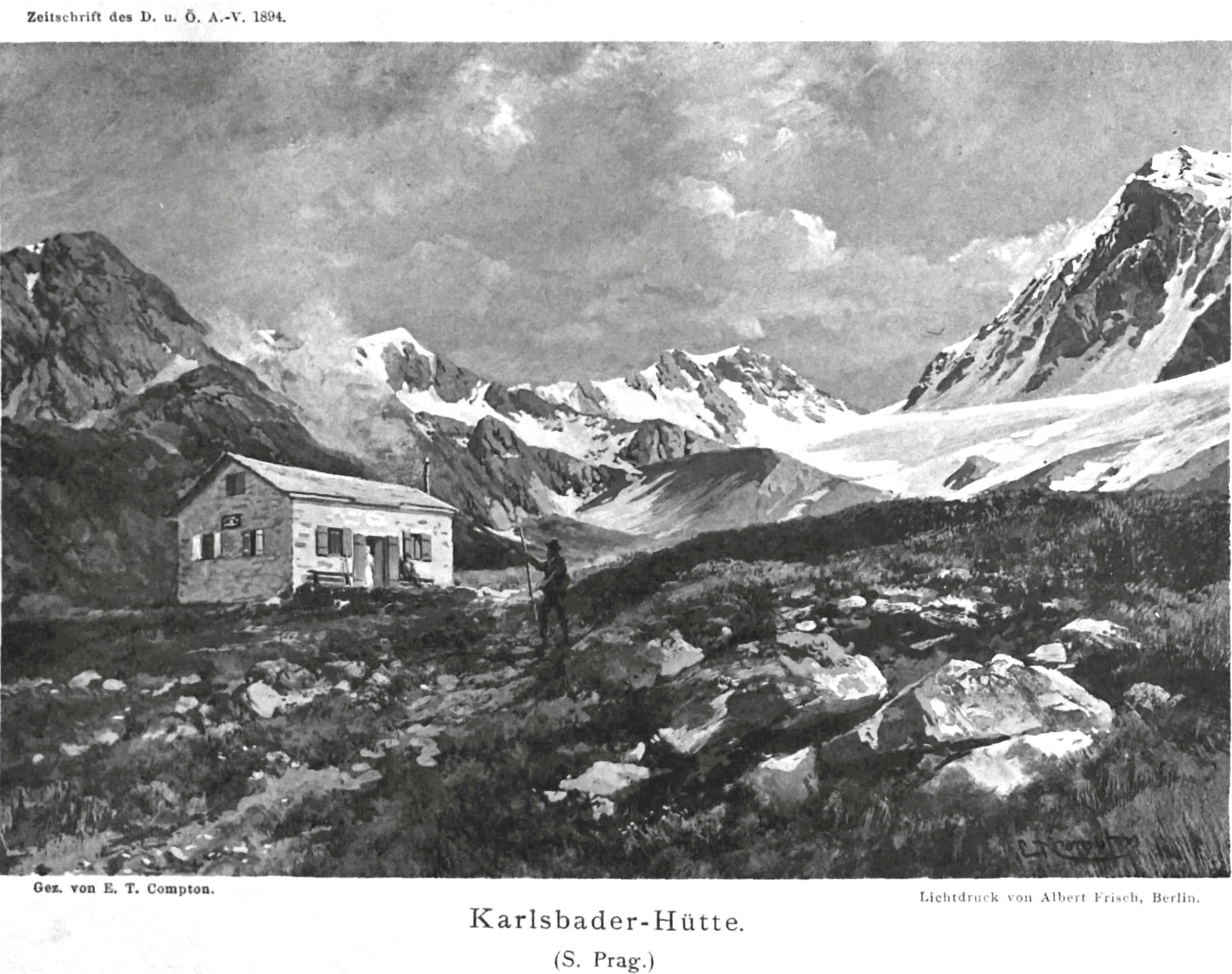 Karlsbader-Hütte aus Zeitschrift des Deutschen und Oesterreichischen Alpenvereins 1894 Band 25